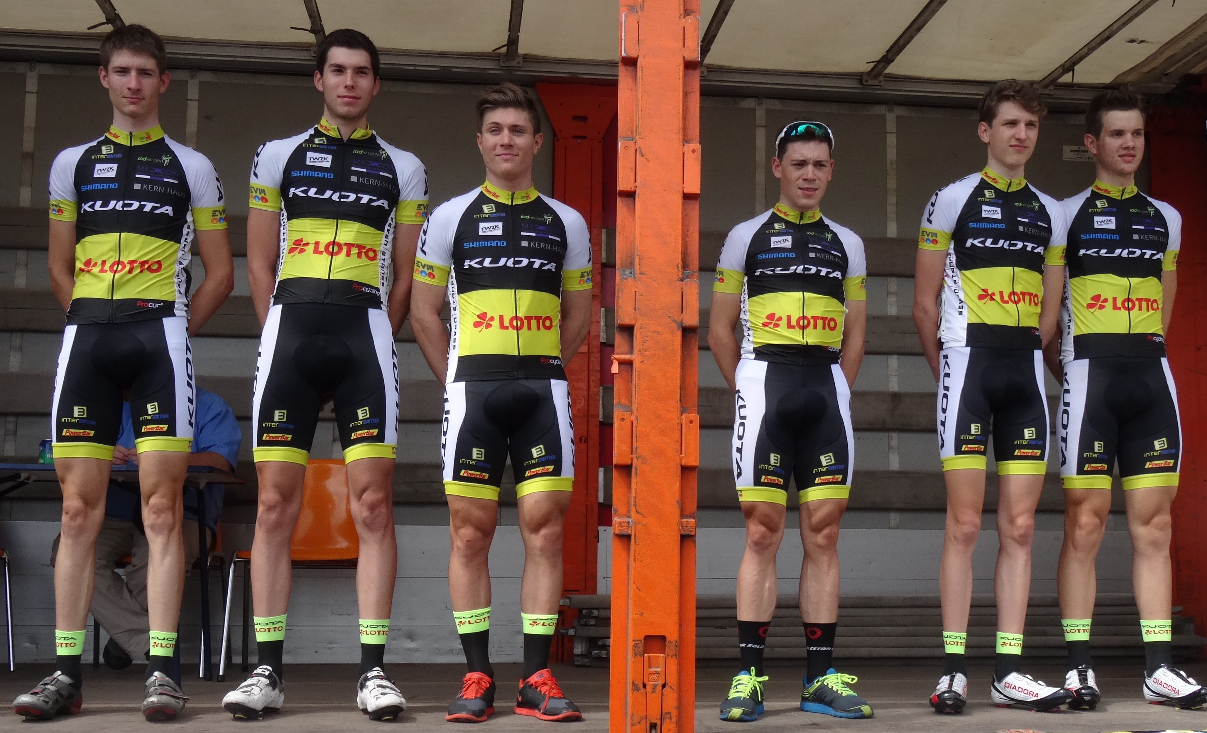 Reportage réalisé le dimanche 8 juin à l'occasion du départ du Mémorial Philippe Van Coningsloo 2014 à Wavre, Belgique.